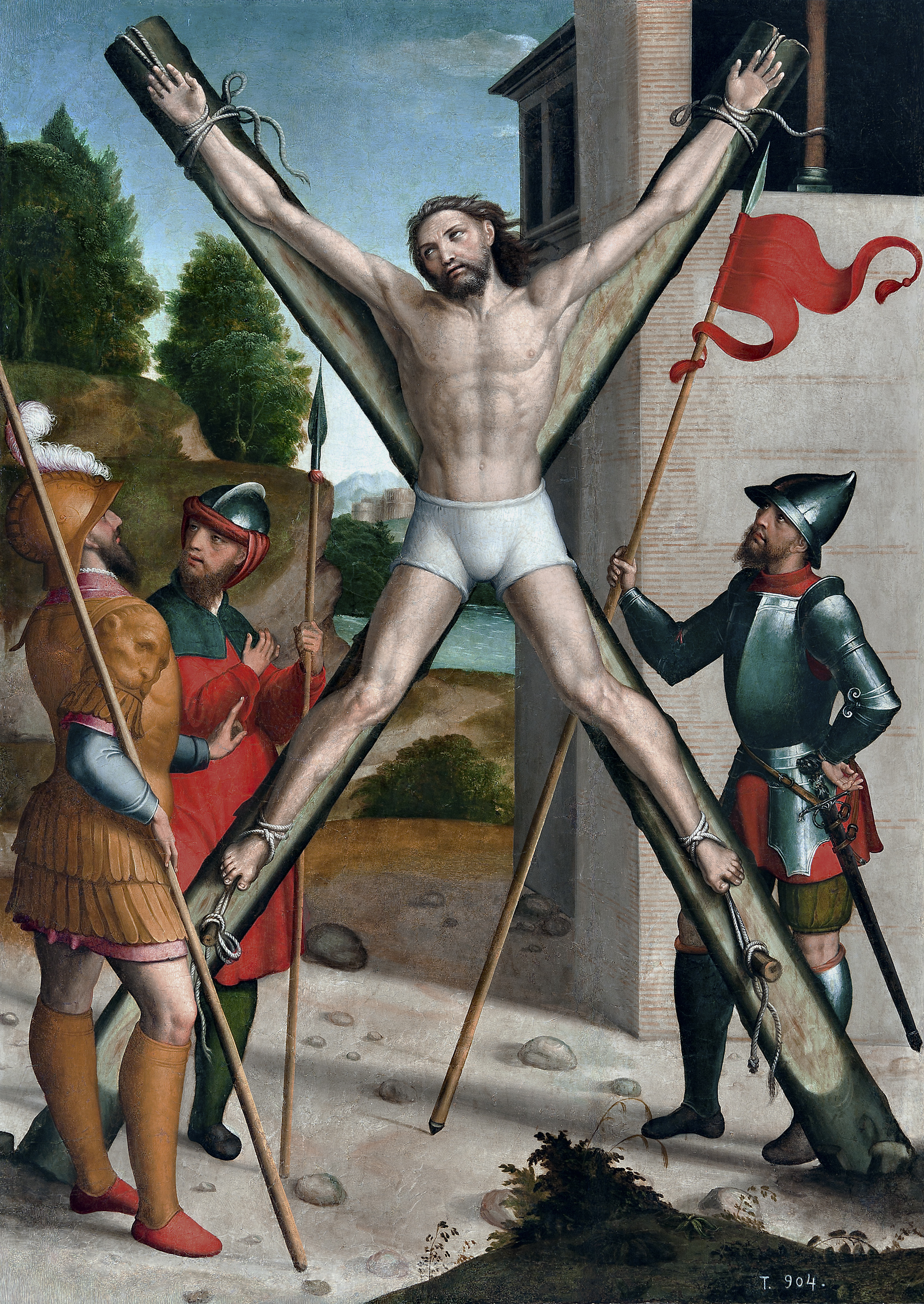 La obra representa la crucifixión del apóstol San Andrés. Flanquean al apóstol y observan pacientemente su larga agonía tres soldados, ataviados con los atuendos característicos de este tipo de personajes en muchas obras de Correa. Los dos situados a la izquierda recuerdan, por sus formas y actitudes similares, aunque en distinta posición, a los dos representados a la izquierda en La Resurrección de Cristo del claustro del desaparecido convento de San Juan de la Penitencia de Toledo, considerada obra de Juan de Borgoña y discípulos, no anterior a 1530, fecha en la que Correa ya estaba incorporado al taller del maestro. La historia se representa delante de un edificio de aparejo toledano. Al fondo se desarrolla un paisaje en profundidad, en el que se divisa una extensión de agua y a lo lejos, entre montañas, diversas construcciones de planta circular, de inspiración clasicista, muy habituales en Correa (Texto extractado de Cortés Hernández, S.; Ocaña Rodríguez, E. en: Juan Correa de Vivar, c. 1510-1566. Maestro del Renacimiento español, 2010).